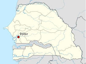 Por simple montri la situon de Ĝiloro (Senegalo).